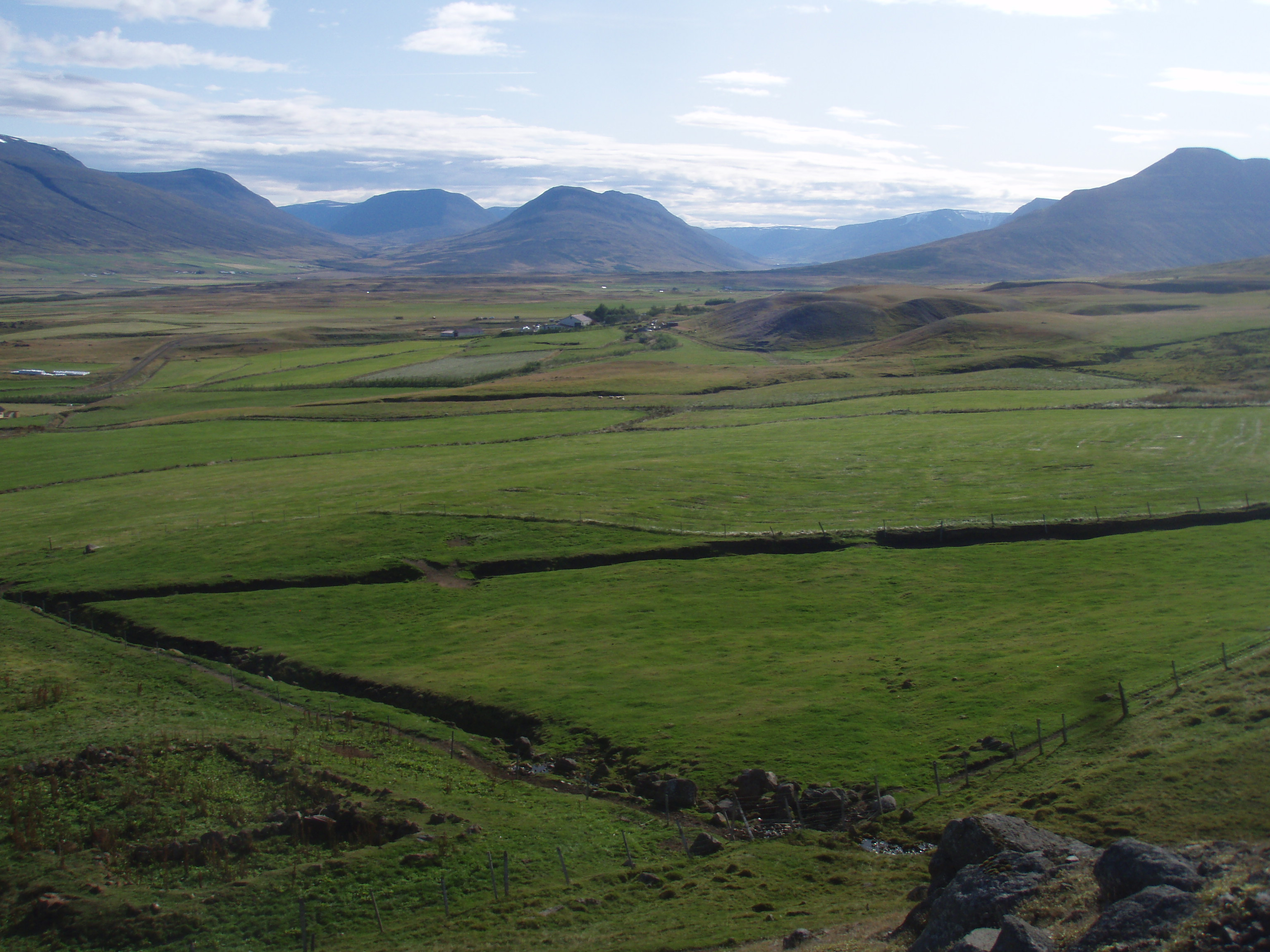 Gilsbakki séður frá hraunjaðrinum við Möðrufell. Fjær sést inn Sölvadal t.v. og Eyjafjarðardal t.h.